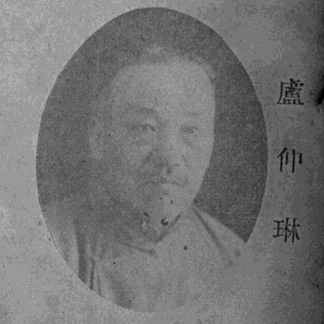 中文（台灣）: 《民國名人圖鑑》肖像